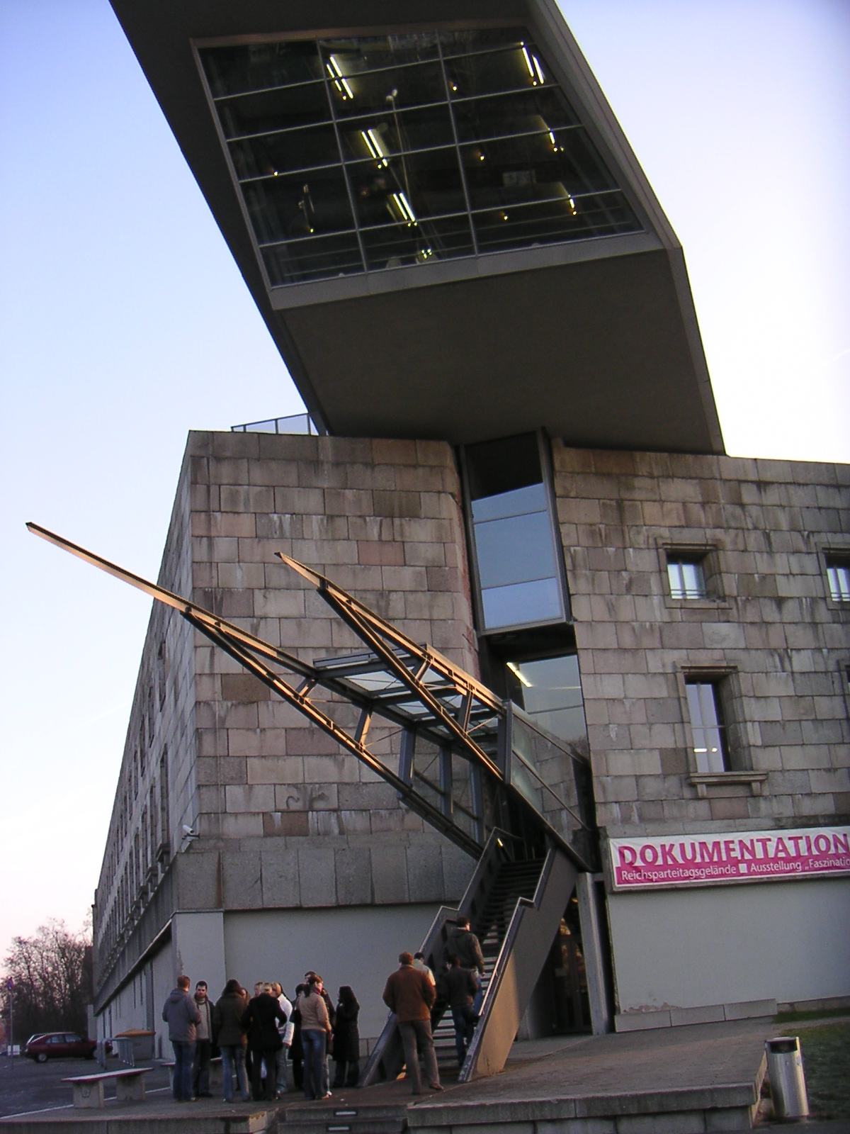 Reichsparteitagsgelände (Area of the Reichsparteitage) in Nuremberg: Kongresshalle (congress hall), Dokumentationszentrum Reichsparteitagsgelände (Documentation Centre Nazi Party Rally Ground)